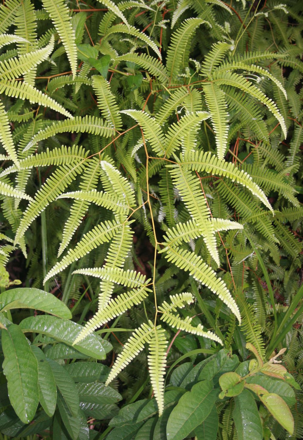 Gleichenella pectinata (= Dicranopteris pectinata), Gleicheniaceae - Costa Rica: Prov. Puntarenas, La Gamba NW Golfito, zwischen "Tropenstation La Gamba"/"Estación Biológica La Gamba" und "Esquinas Rainforest Lodge"